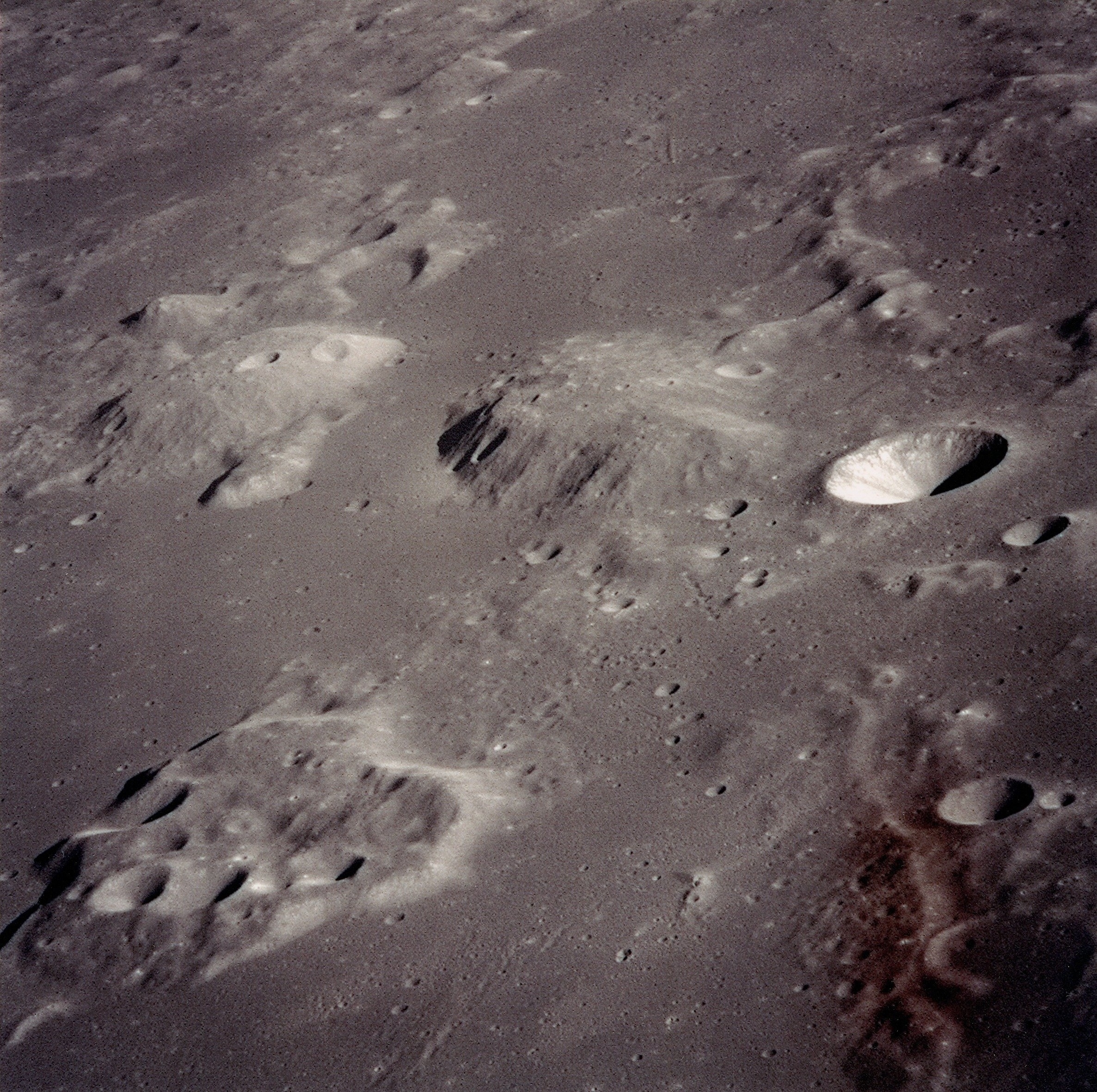 Domos Gruithuisen Delta, Gamma y NW (Northwest).